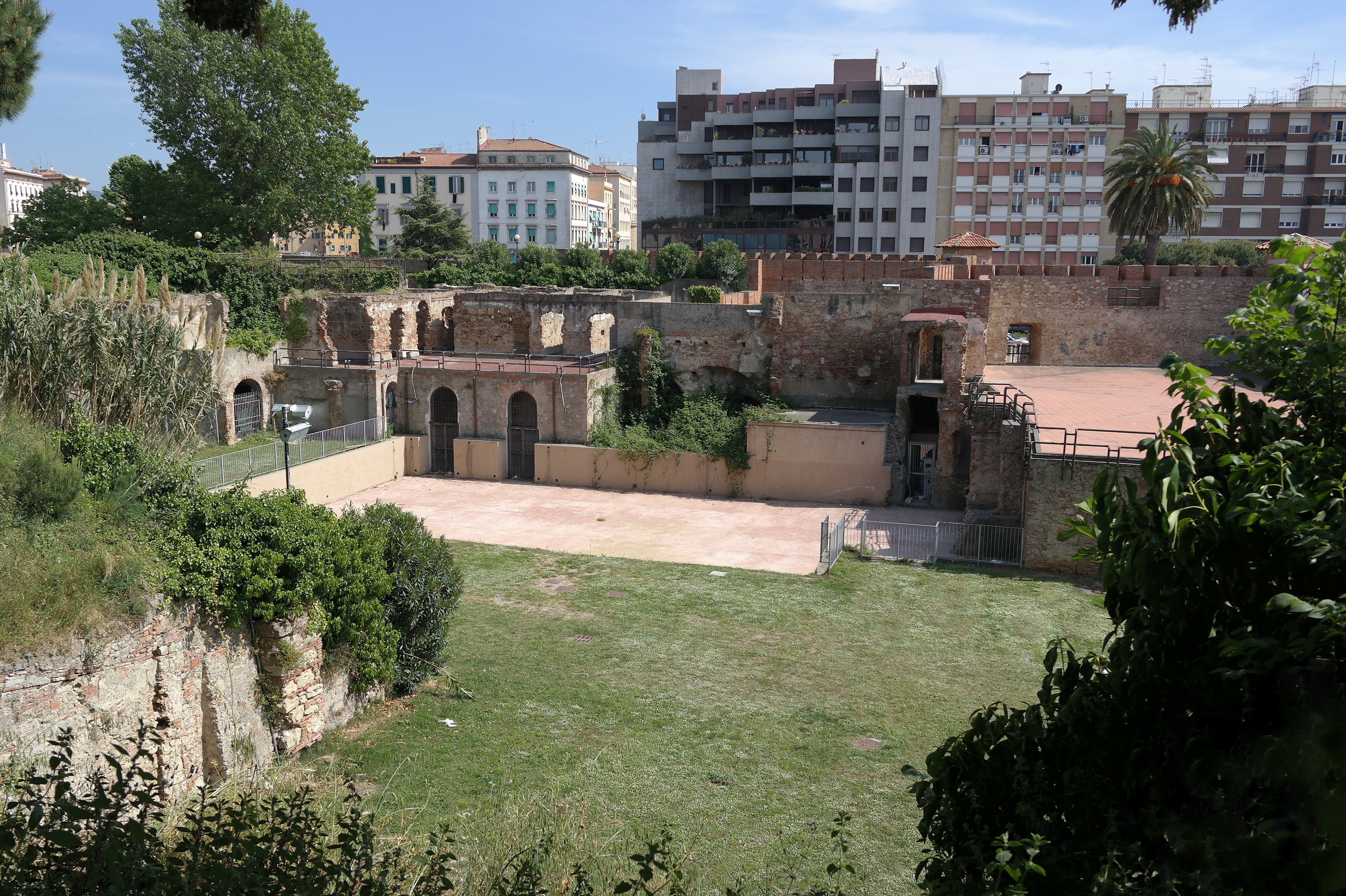 Interno della Fortezza Nuova a Livorno